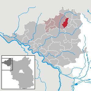 Triglitz in Brandenburg (Country) - District Prignitz